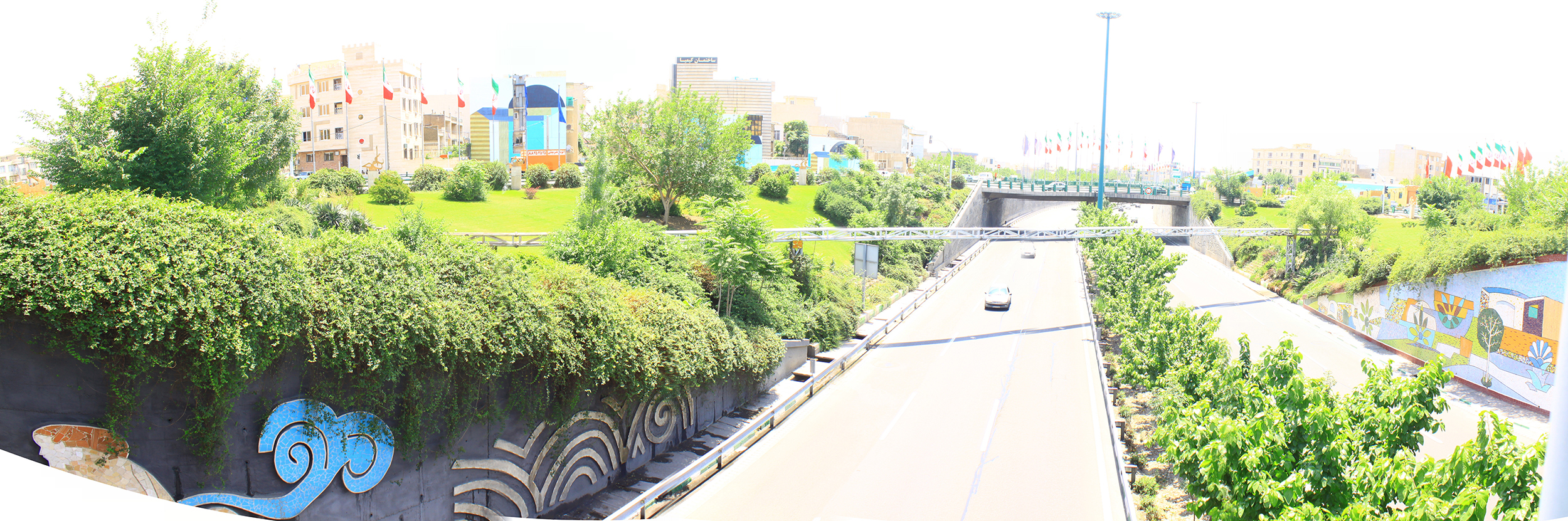 عكس پانوراما از شمال ميدان سبلان